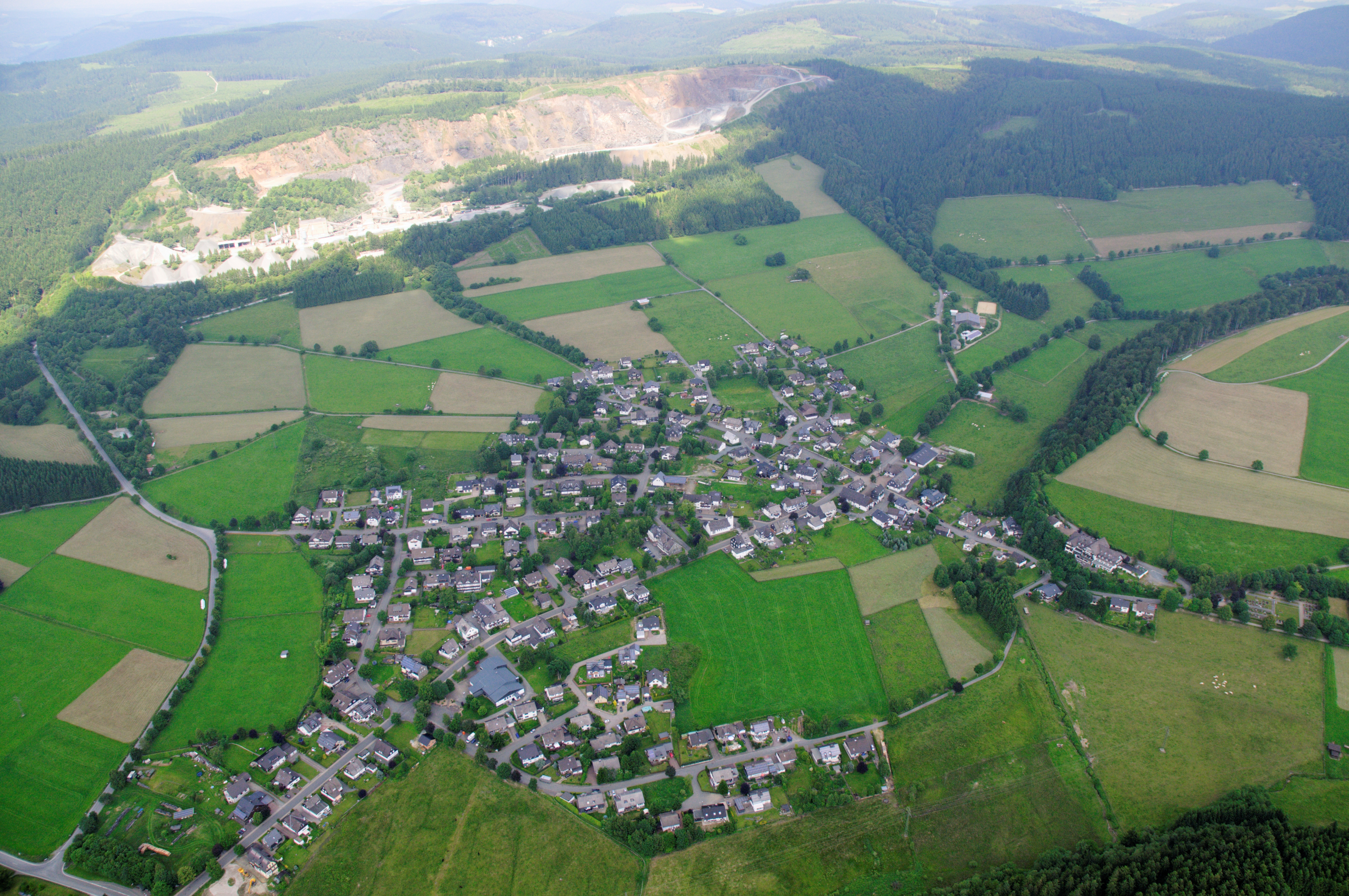 Fotoflug Sauerland-Ost, Winterberg-Hildfeld mit Landschaftsschutzgebiet Kulturlandschaftskomplex Grönebach / Hildfeld ums Dorf; MHI Steinbruch am Clemensberg und Wald vom LSG Winterberg The making of this document was supported by the Community-Budget of Wikimedia Germany.